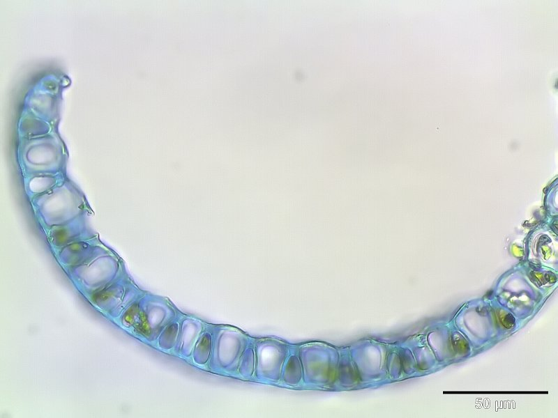 Trügerisches Torfmoos (Sphagnum fallax), Astblatt-Querschnitt, Vergrößerung: 400x